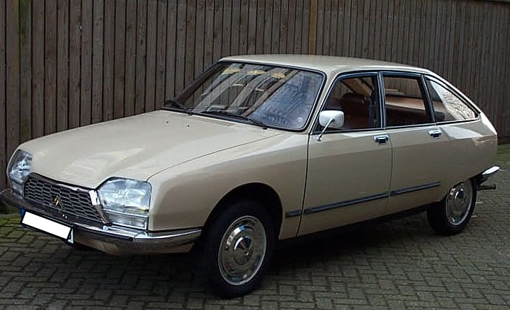 Citroen GS Pallas 1975